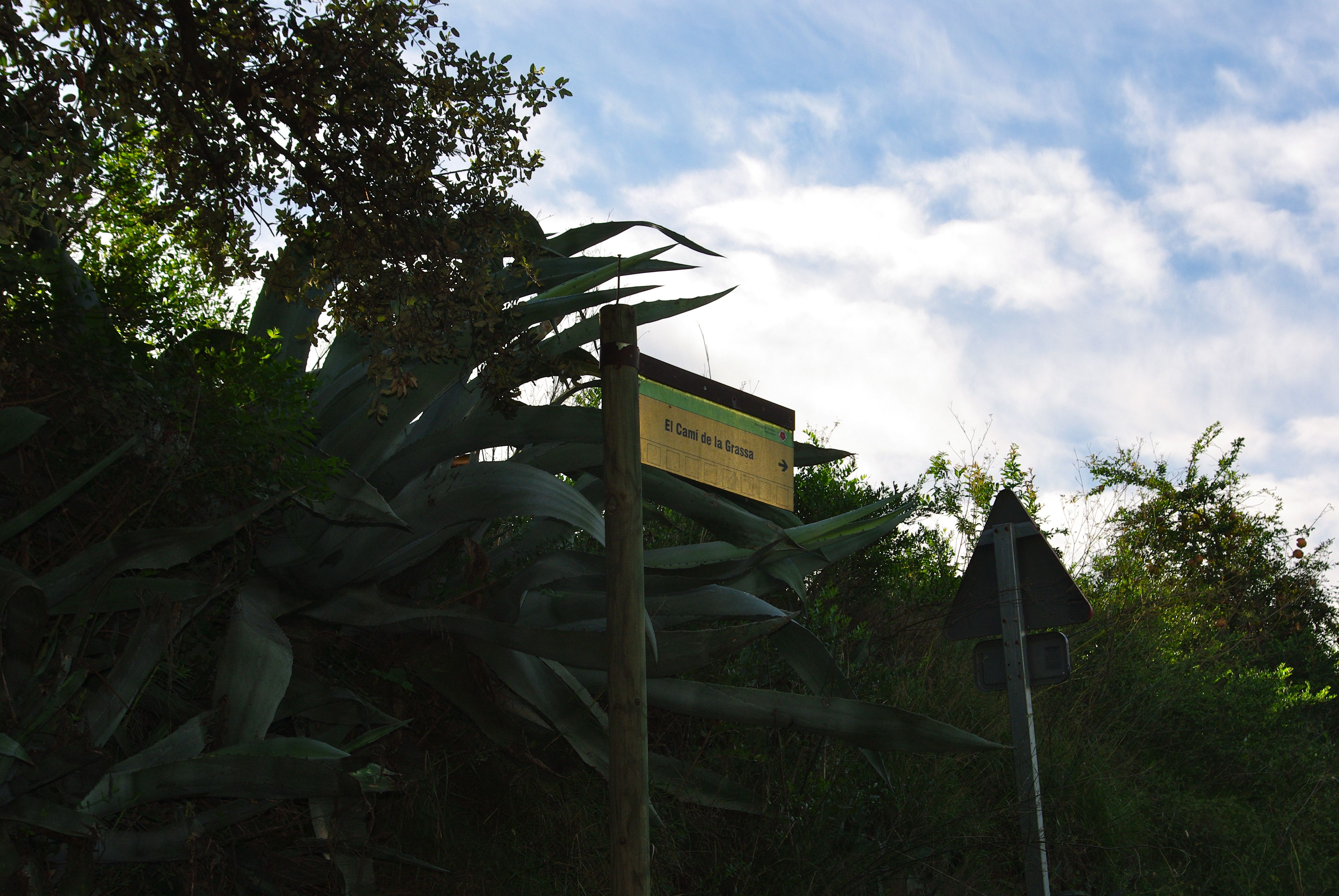 El Camí de la Grassa en els seus inicis, vora el camí del Burgar